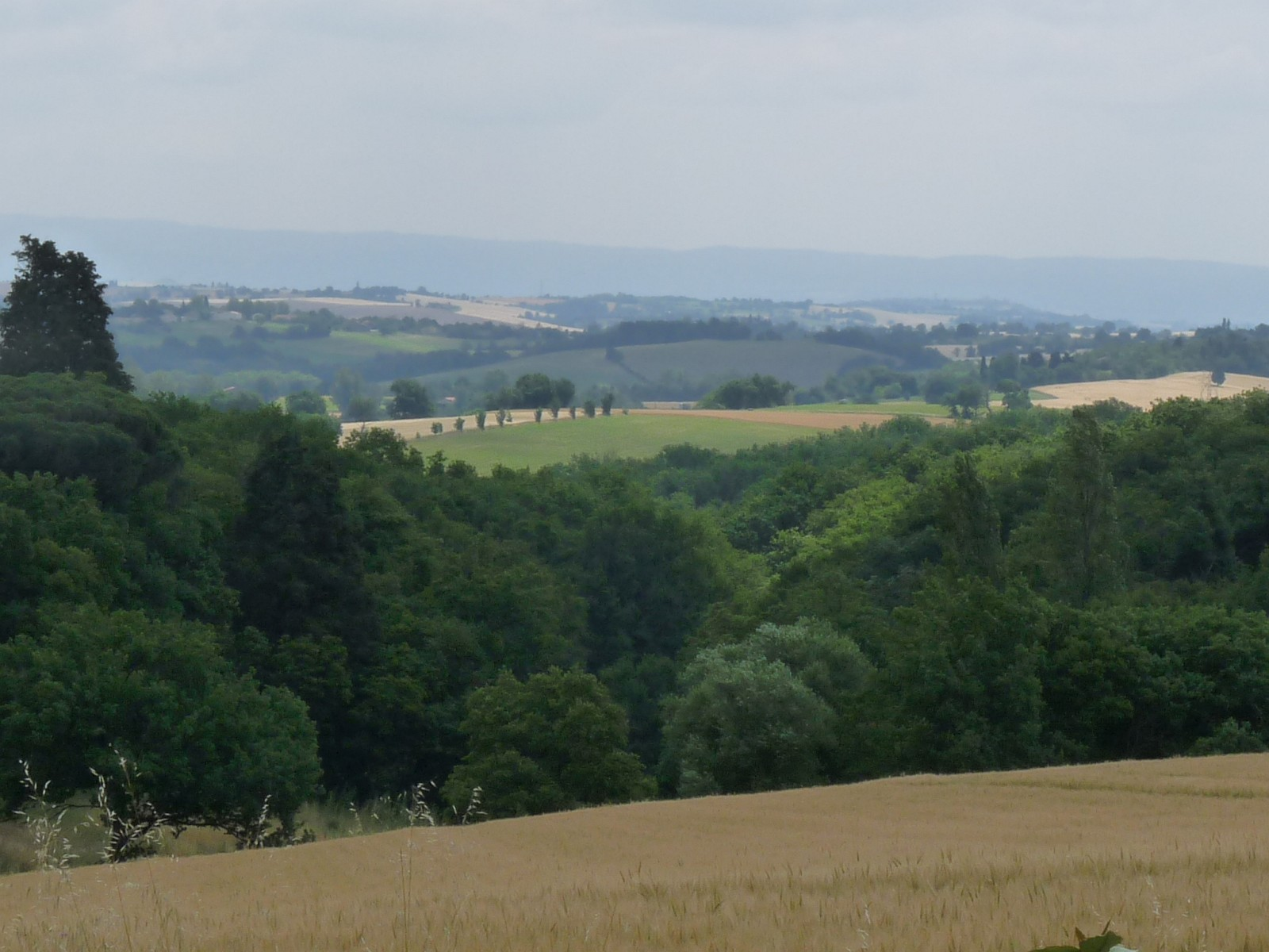 Vue vers la Montagne Noire, Prunet, Haute-Garonne, France